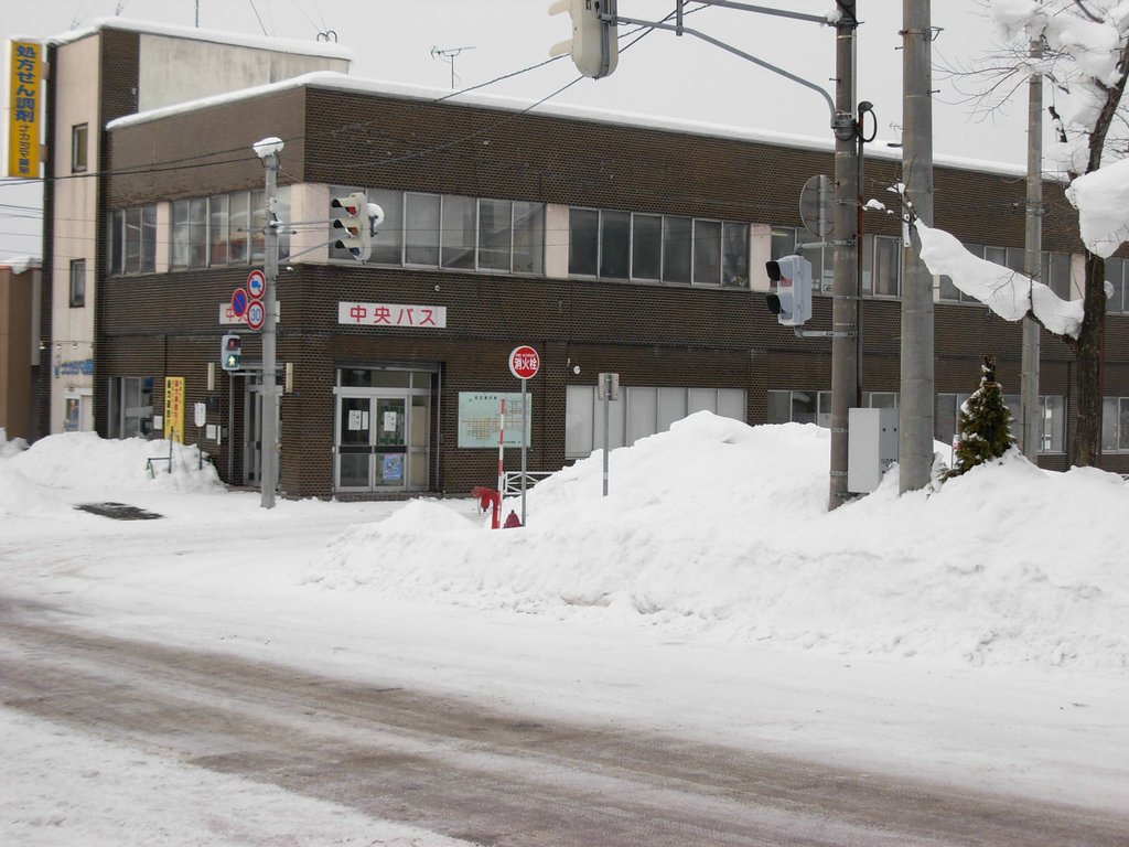 砂川ターミナル(Sunagawa bus terminal)